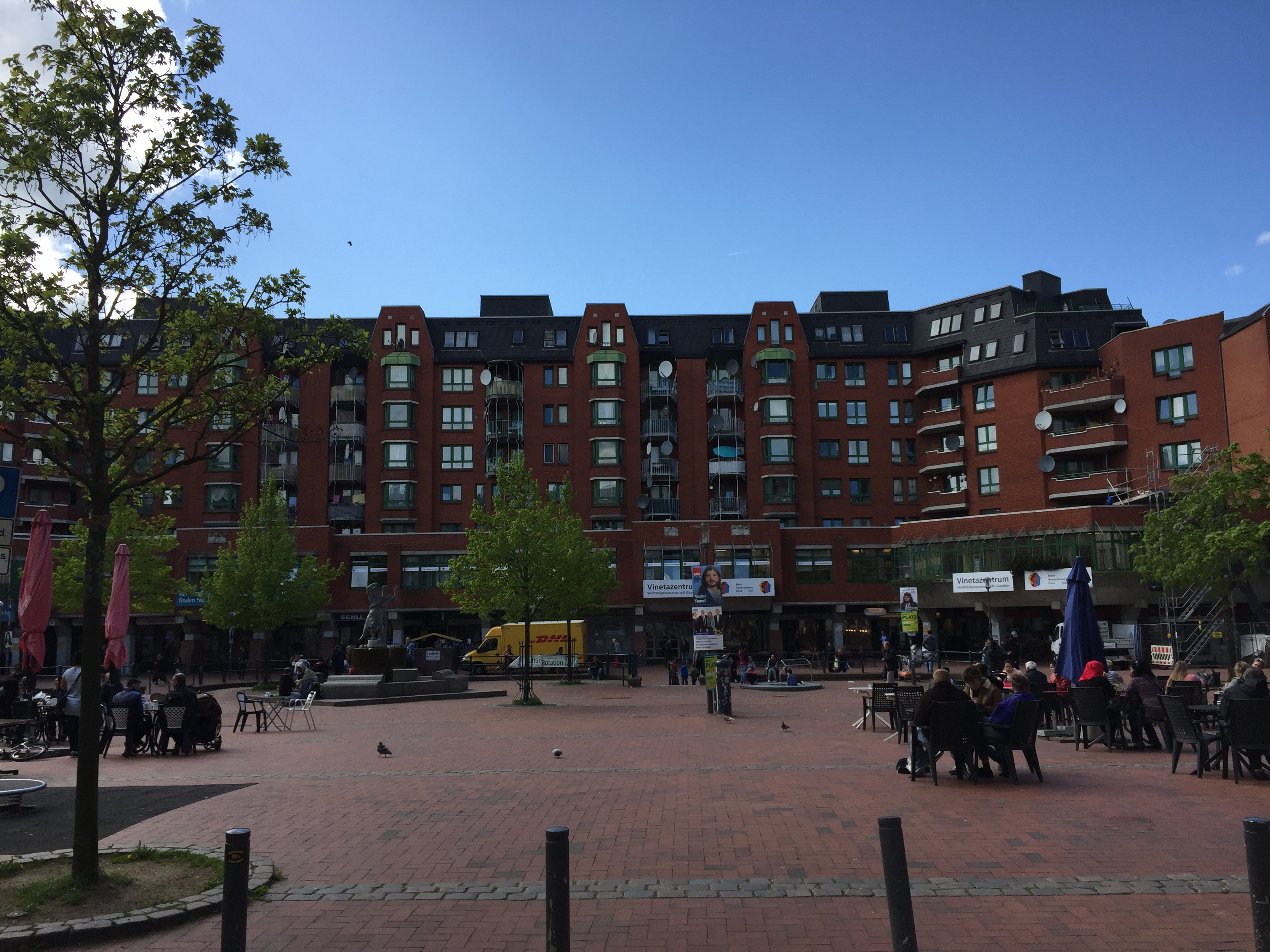 Vinetaplatz in Kiel-Gaarden mit Vinetabrunnen